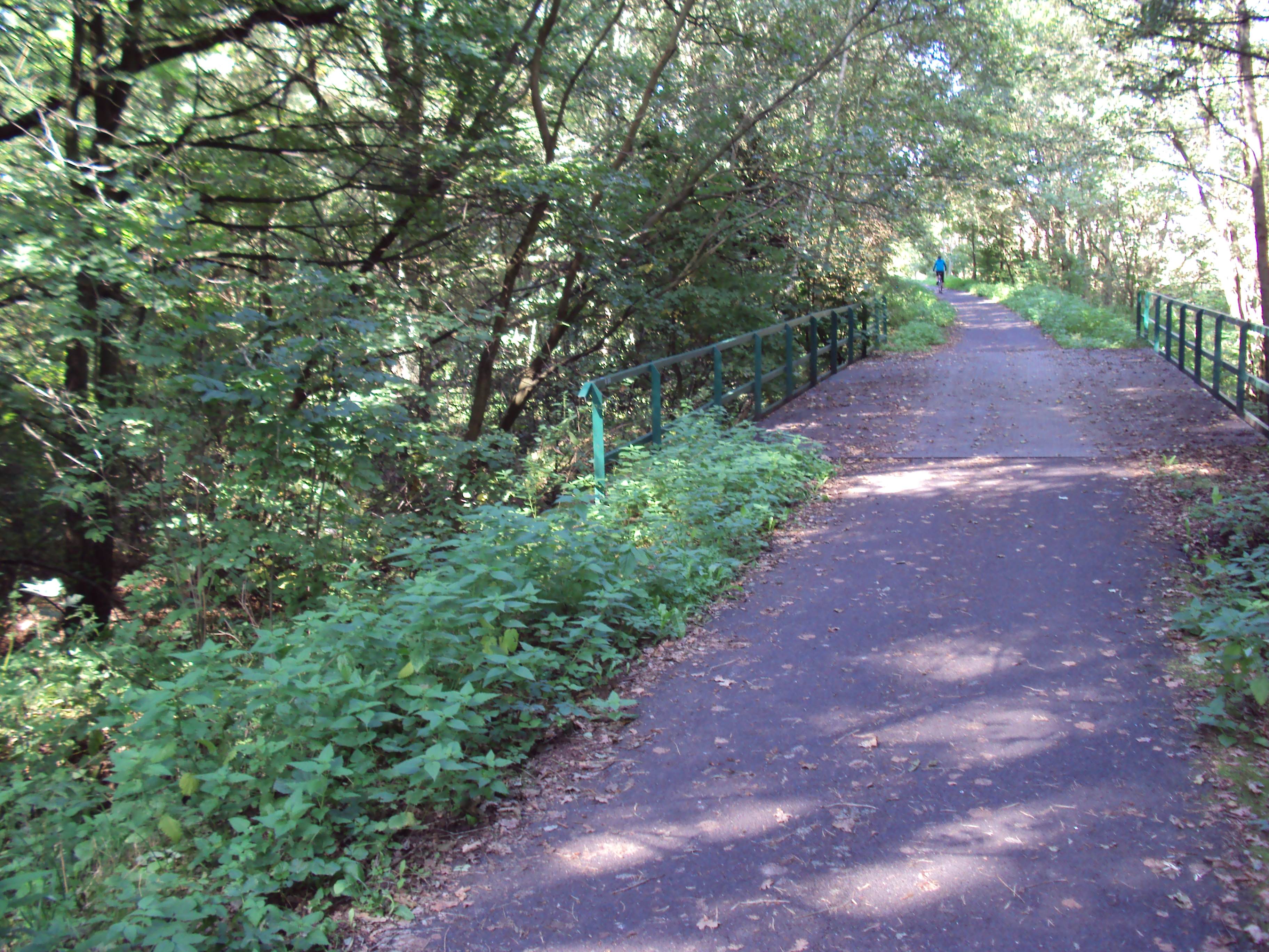 Cyklostezka Žízníkov, trasa 3054, asi 1 km od žlz.zastávky Vlčí Důl Dobranov